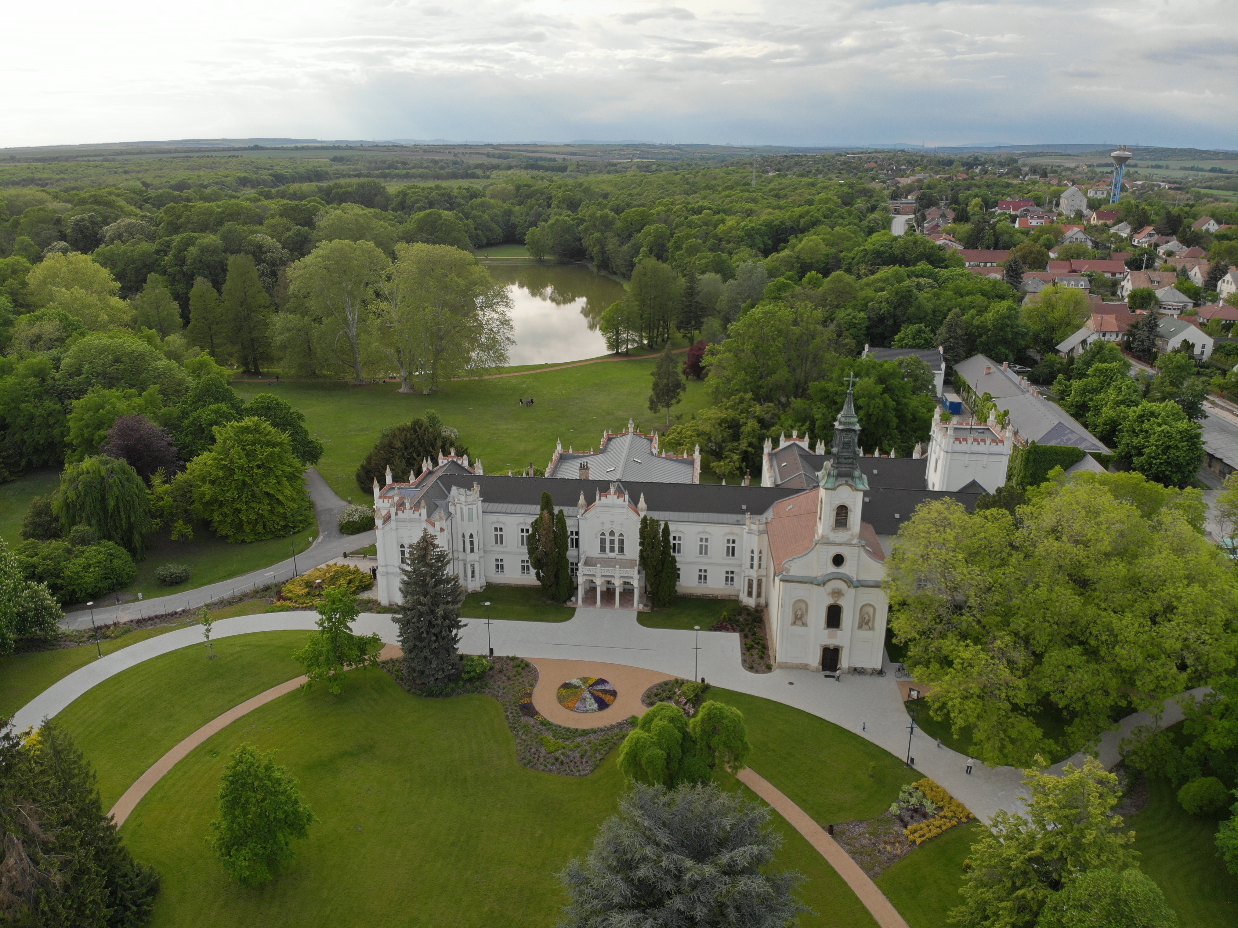 Brunszvik kastély, Martonvásár